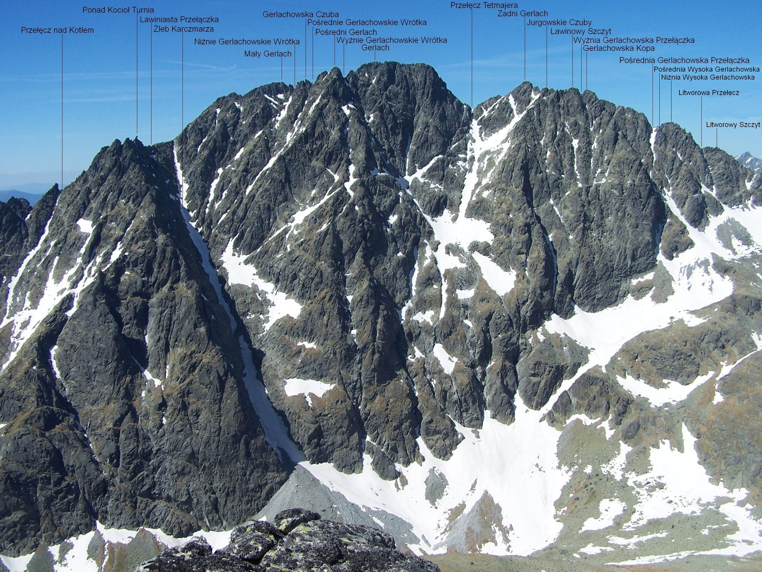 Gerlach. Widok z podejścia na Staroleśny Szczyt